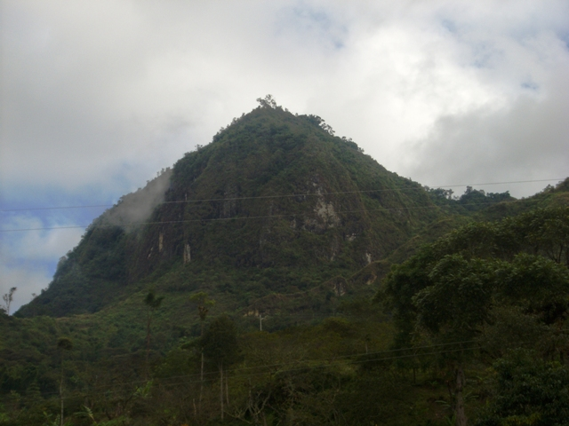 Montaña en detalle